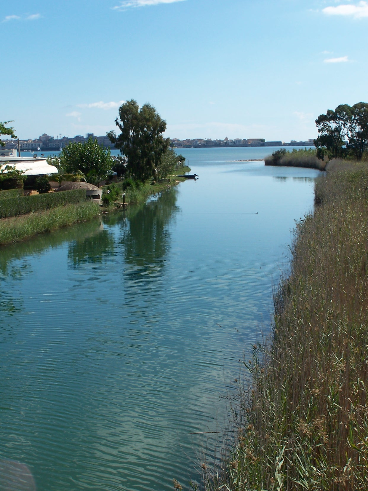 Foce del fiume Anapo, vicino a Siracusa.